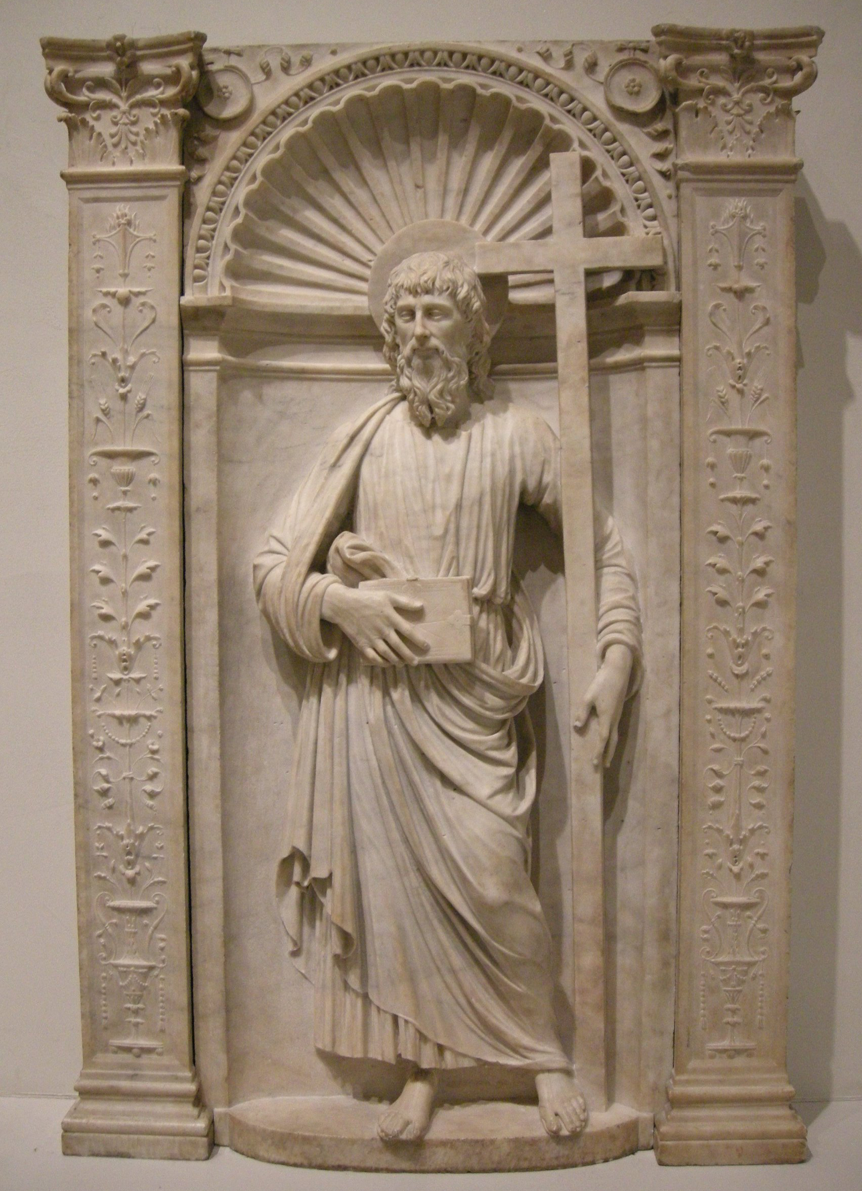 Andrea bregno, sant'andrea, 1491 roma